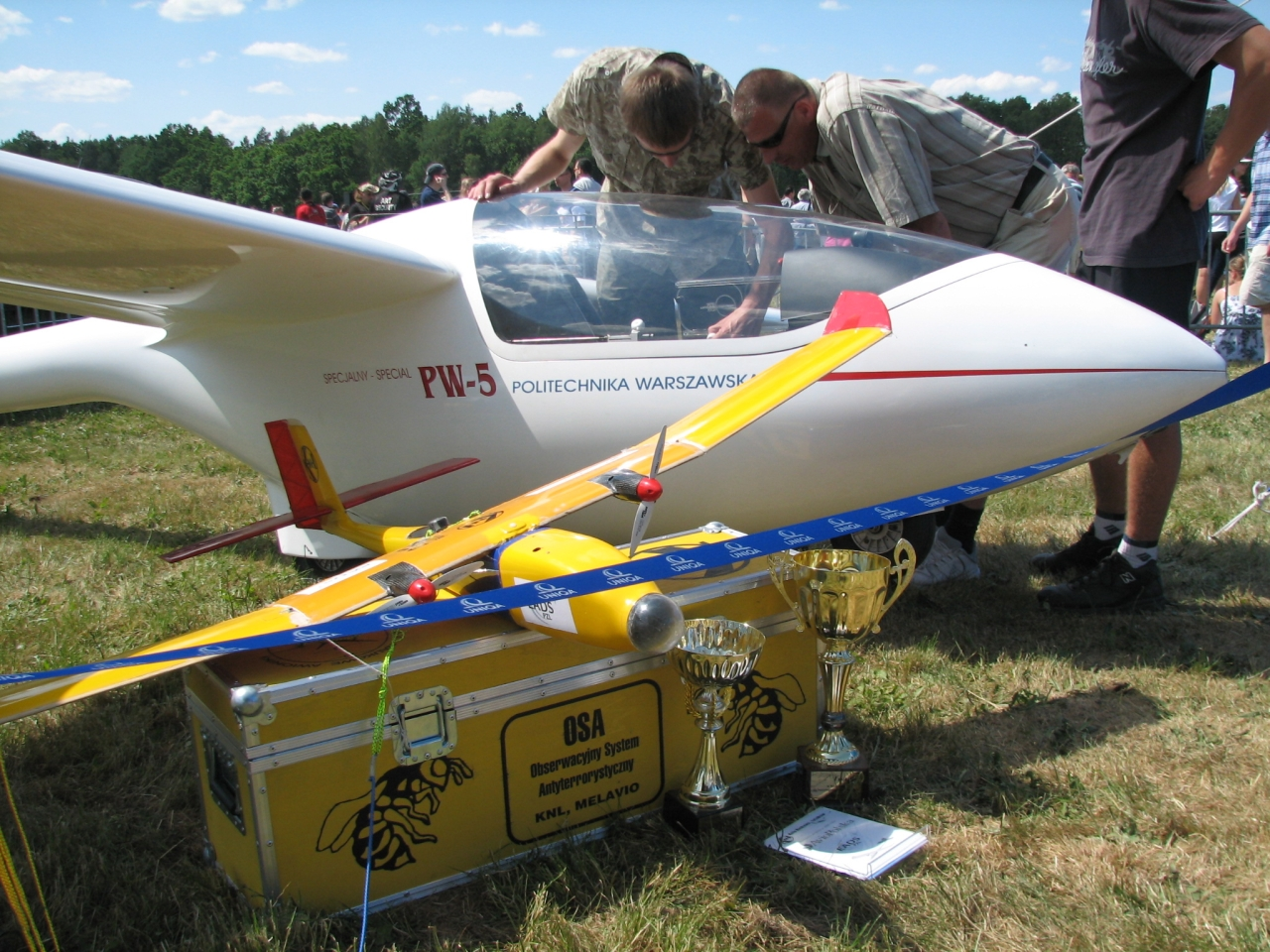 Prototyp szybowca PW-5 podczas wystawy na XIII MPL w Góraszce 2008.